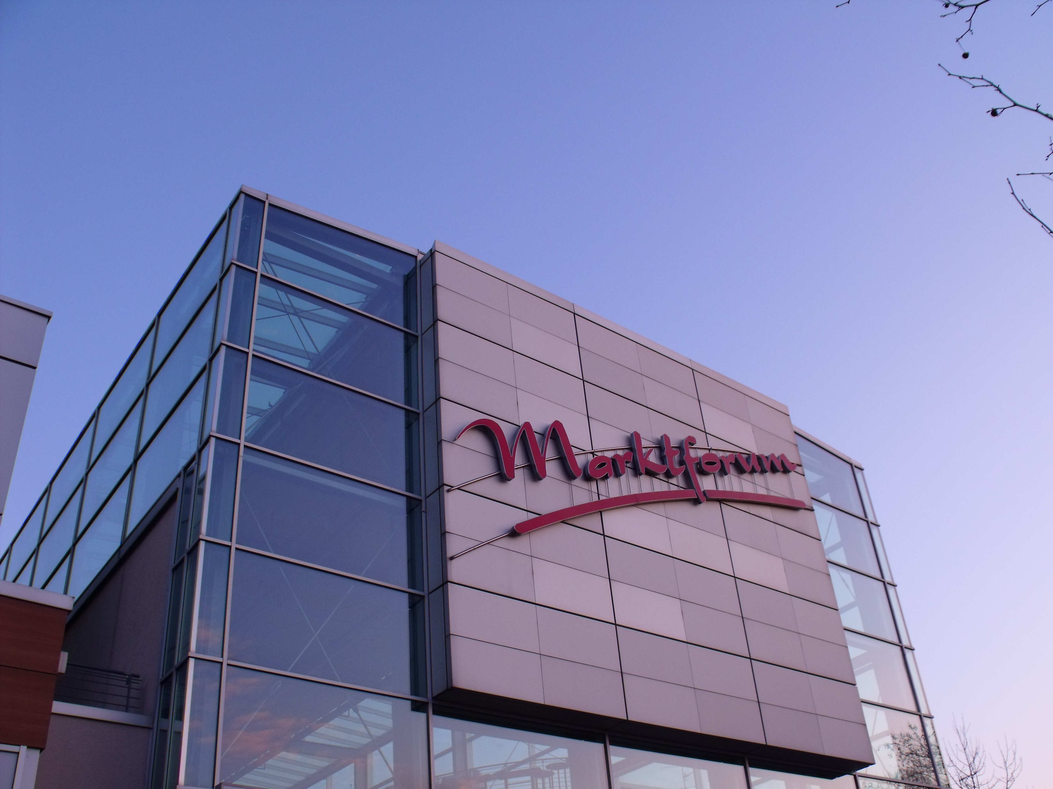 Marktforum in Duisburg Rheinhausen.